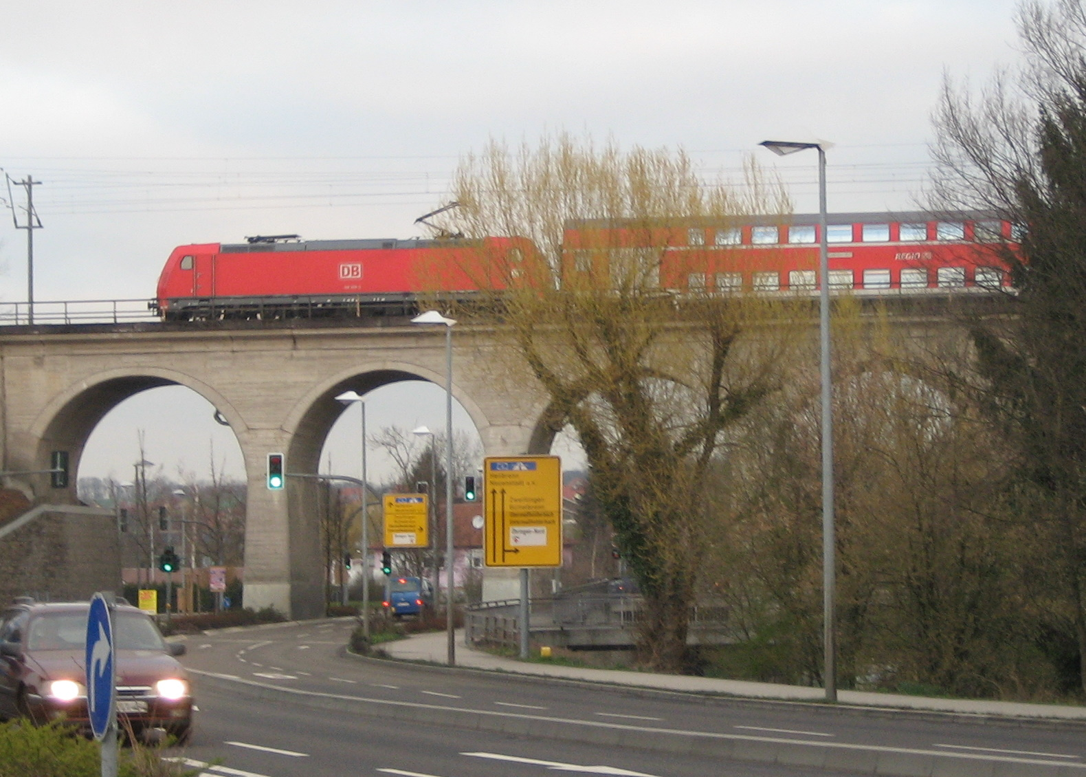 Öhringen Viadukt mit Doppelstockwagen